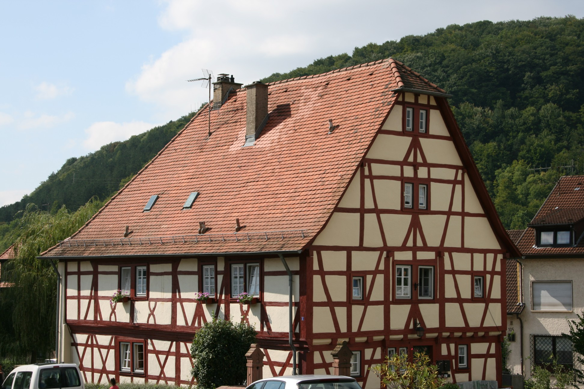 Gutleuthaus, Bestandteil der Gutleutanlage